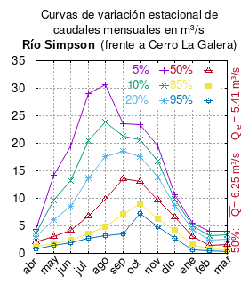 Curvas de variación estacional del río Simpson, aguas abajo de la confluencia del río Oscuro. # Dirección General de Aguas # Diagnóstico y clasificación de los cursos y cuerpos de agua según objetivos de calidad. Cuenca del río Aysén. # Santiago de Chile # Ministerio de Obras Públicas (Chile) # 2004 # url: # urlarchivo: # Tabla 4.5: Estación Blanco Chico antes de junta con Oscuro , pág. 53 mes 5% 10% 20% 50% 85% 95% abr 4.31 3.75 3.13 2.14 1.25 0.87 may 14.26 9.60 6.14 3.02 1.77 1.52 jun 19.44 13.20 8.49 4.16 2.37 2.00 jul 29.05 20.50 13.66 6.78 3.53 2.74 ago 30.63 23.87 17.64 9.90 4.86 3.20 sep 23.47 21.26 18.59 13.47 7.17 3.47 oct 23.41 20.57 17.59 13.04 9.02 7.26 nov 19.54 16.74 13.87 9.68 6.22 4.80 dic 10.64 9.76 8.70 6.66 4.15 2.68 ene 5.45 4.92 4.28 3.05 1.54 0.65 feb 4.04 3.22 2.45 1.45 0.76 0.52 mar 4.00 3.34 2.66 1.63 0.71 0.29 This plot was created with Gnuplot.